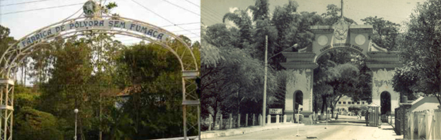 Antigo Pórtico da Fábrica de Pólvoras sem Fumaça e atual Pórtico, agora Fábrica Presidente Vargas (Foto de Lety e Arquivo de Mª Auxiliadora Vieira)